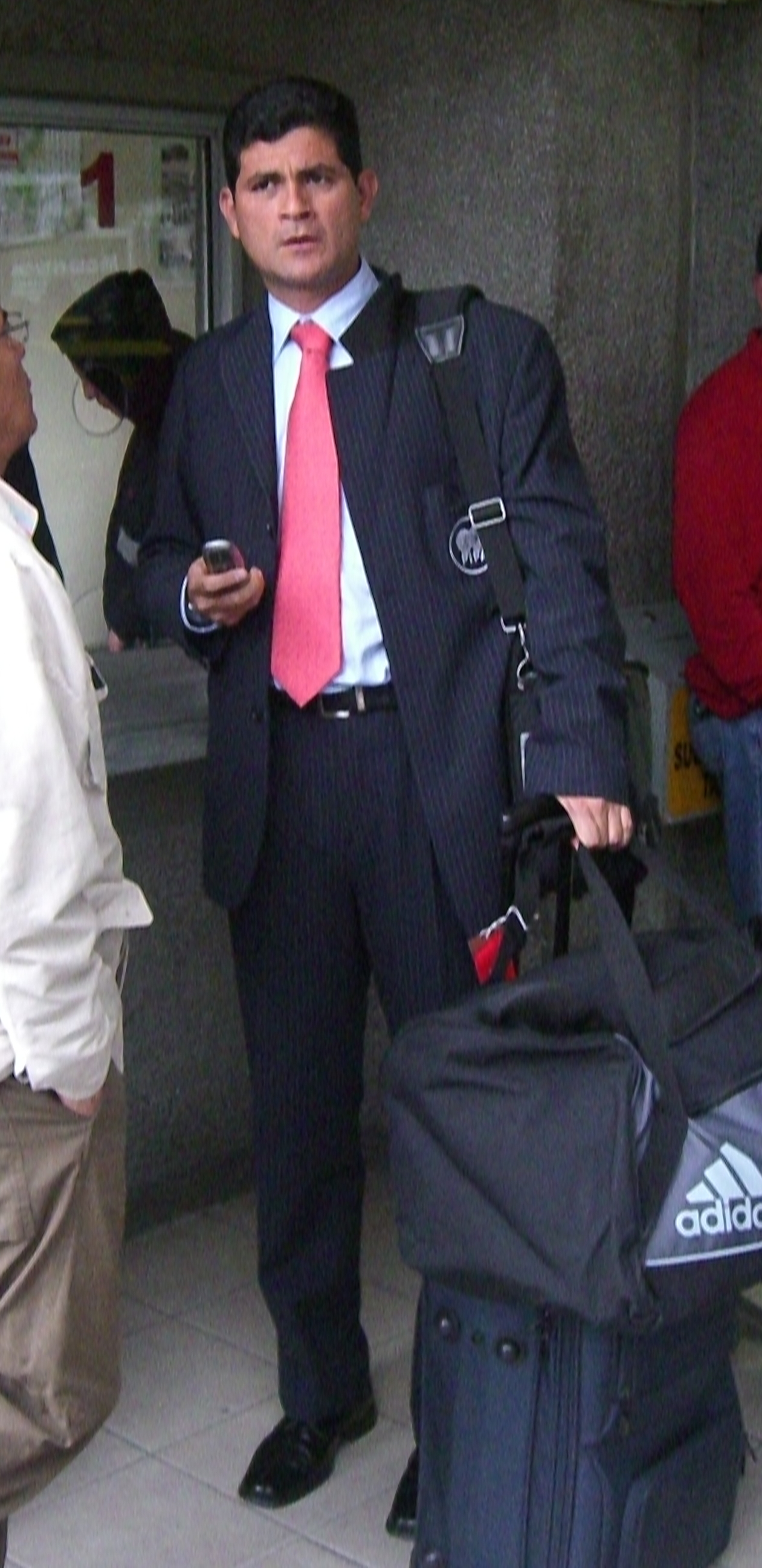 Óscar Julián Ruiz un árbitro de fútbol (FIFA)